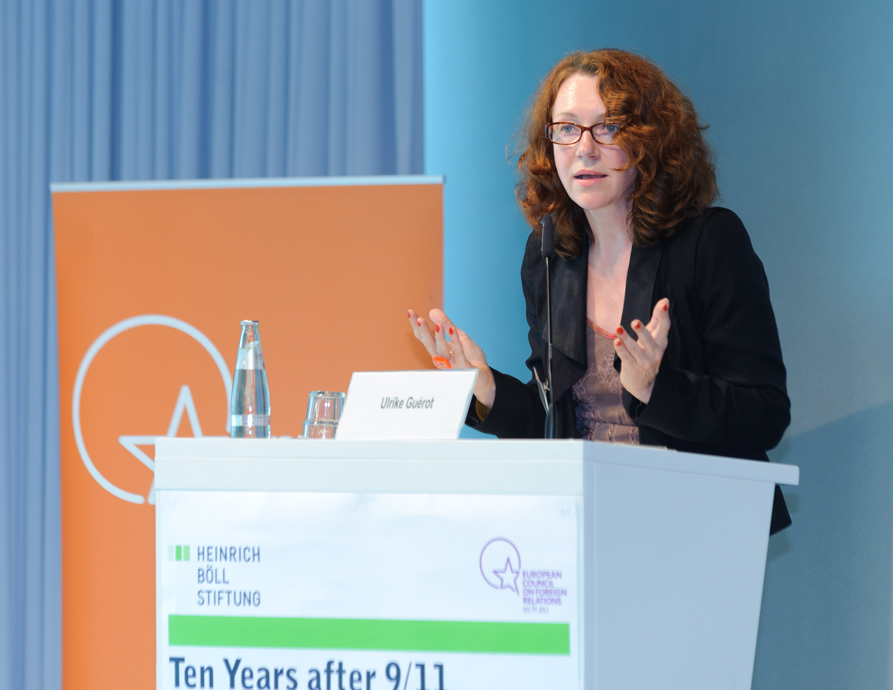 Ulrike Guérot (Leiterin des Berliner Büros des ECFR Europiean Council on Foreign Relations)